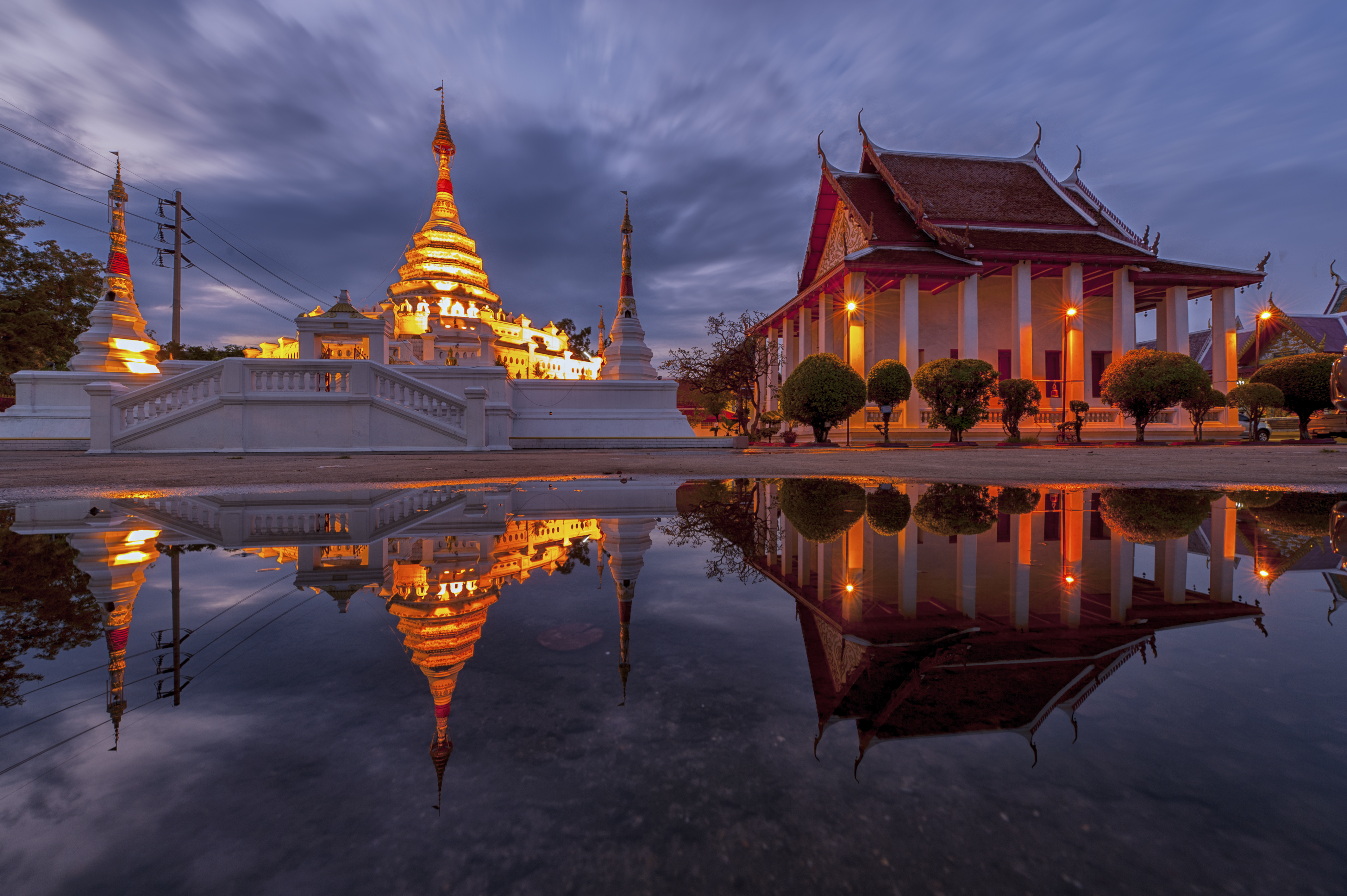 วัดทรงธรรมวรวิหาร เป็นพระอารามหลวงชั้นโท ชั้นวรวิหาร ตั้งอยู่ที่อำเภอพระประแดง จังหวัดสมุทรปราการ เป็นวัดในพุทธศาสนารามัญนิกาย สร้างขึ้นในสมัยรัชกาลที่ 2 โดยสมเด็จพระอนุชาธิราช